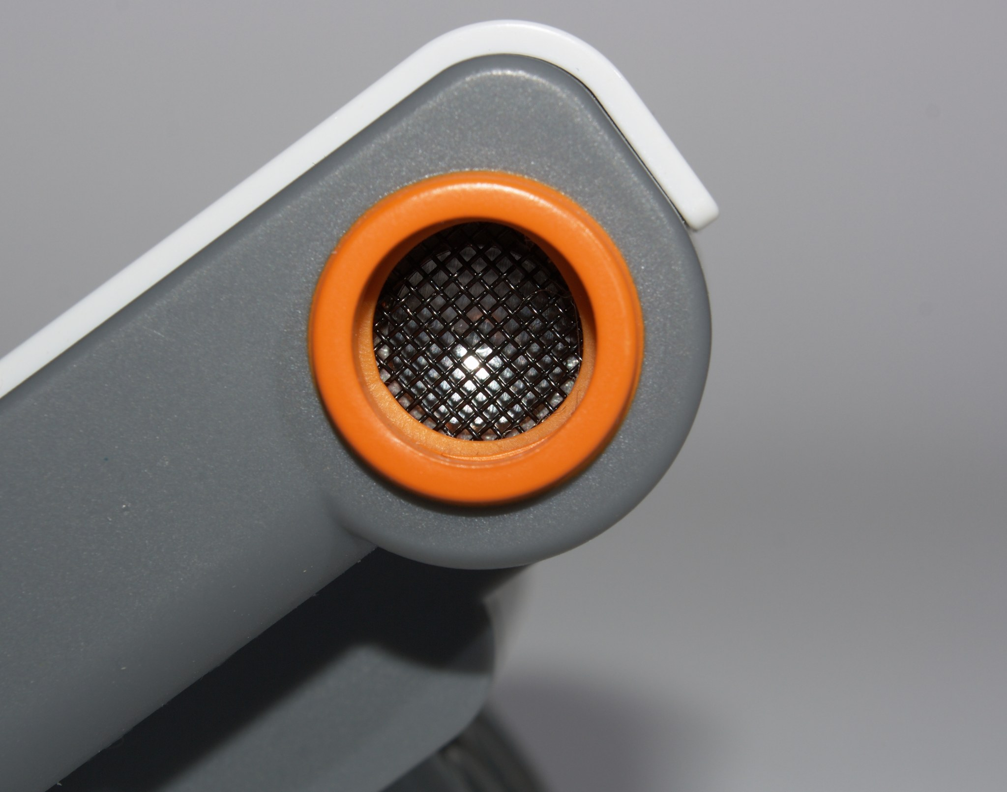 Lego Mindstorms NXT Ultraschall-Entfernungssensor